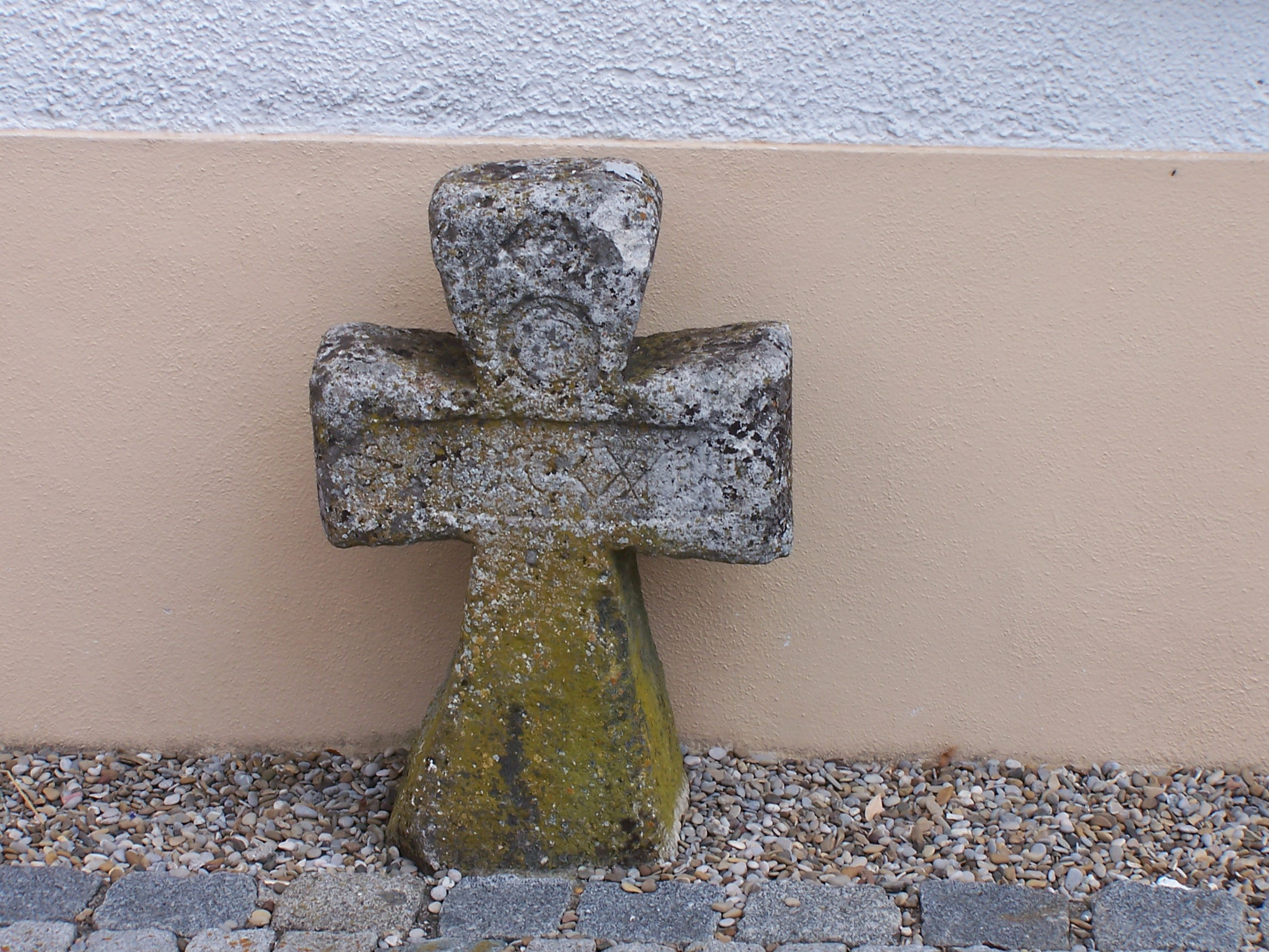 Steinkreuz neben dem Westportal der Wallfahrtskirche St. Ottilia in Hellring, Landkreis Kelheim in Niederbayern. Höhe 90 cm. Am Querbalken ist die Jahreszahl 1733 in römischen Ziffern zu lesen. MDCCXXXCCC